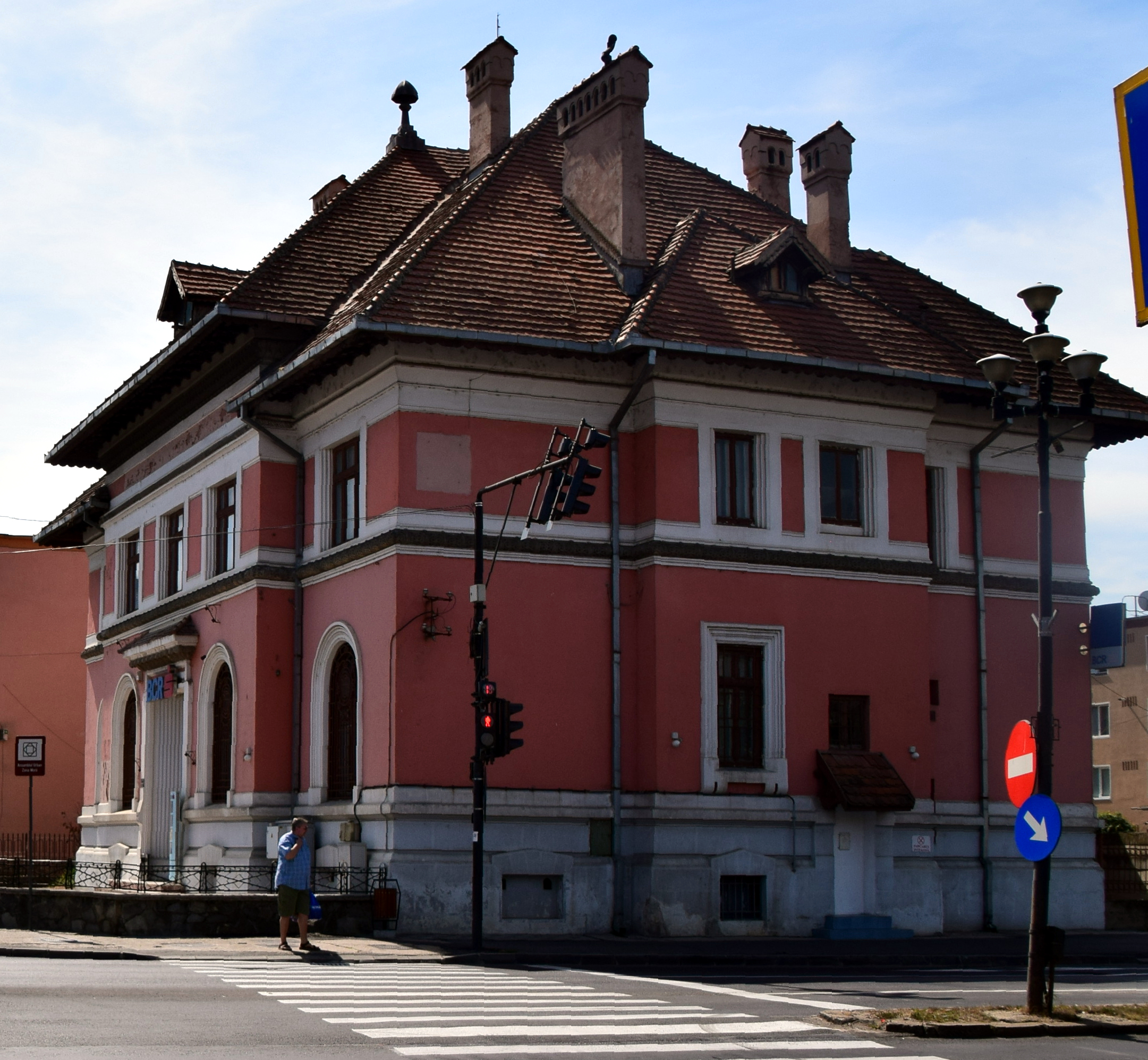 Banca Națională - filiala Făgăraș